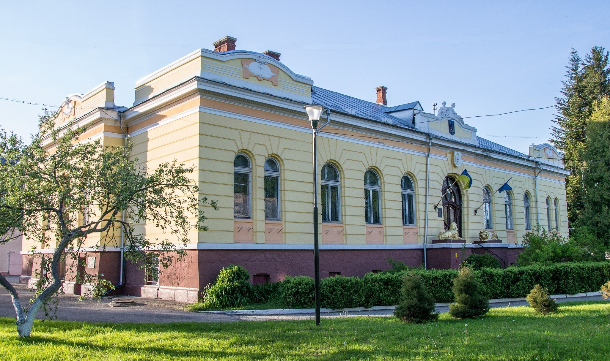 Будинок повітового староства (мур.), Надвірна, вул. Гетьмана Мазепи, 29